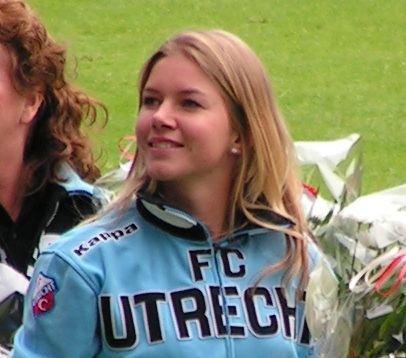 Nederlands voetbalster Anouk Hoogendijk in Stadion Galgenwaard